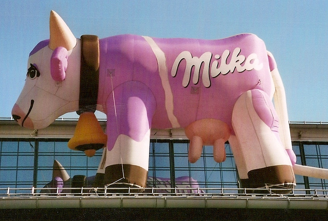 "Milka"-Promotion an der Schrannenhalle in München